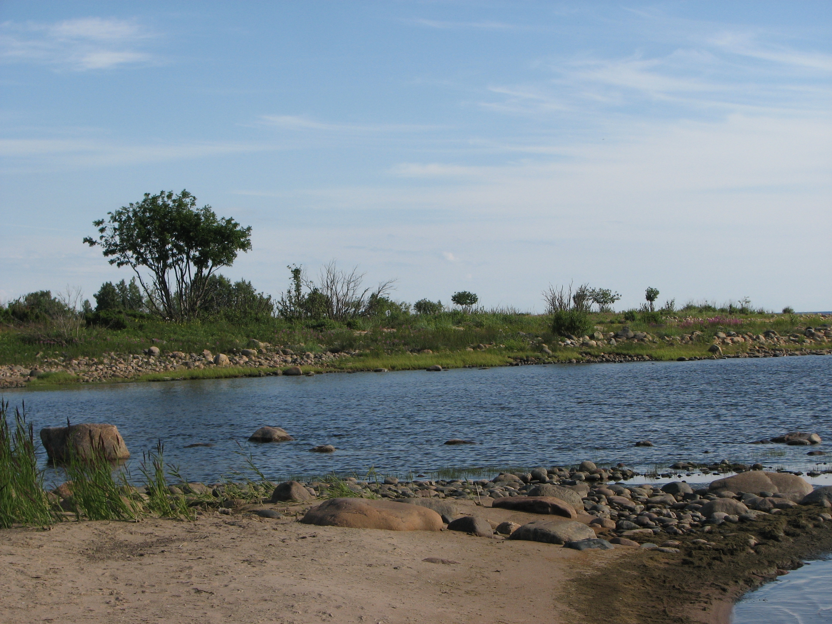 Landscape of Sandskär island